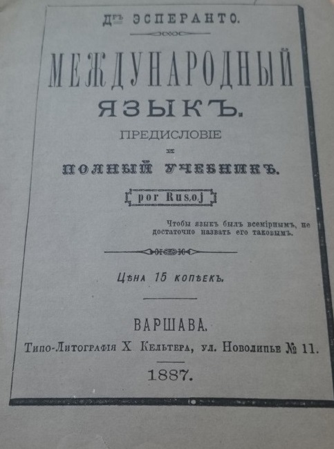 Unua libro per russi - 1887 - copertina fronte